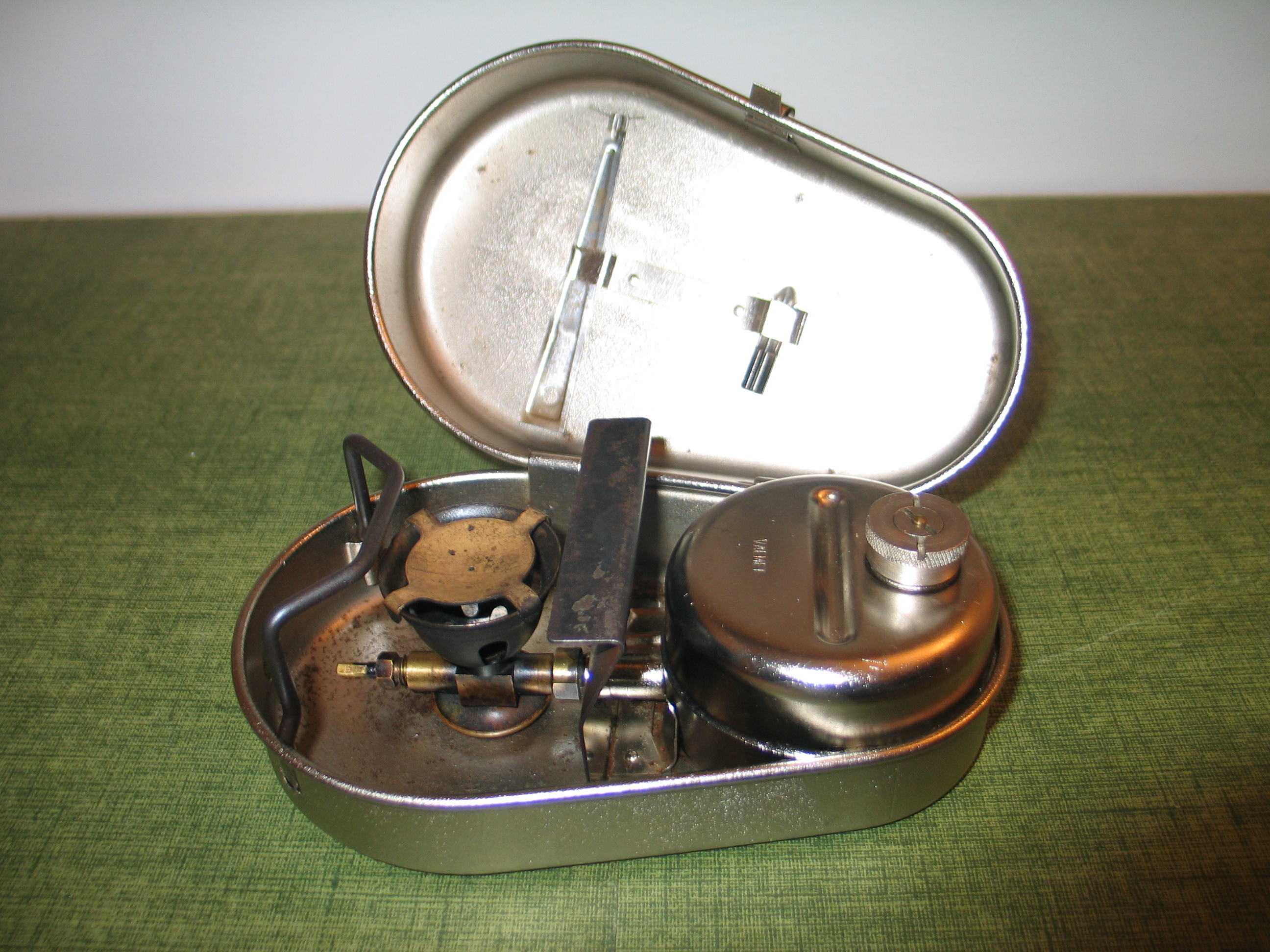 Valmet eräkeitin 1950-luku